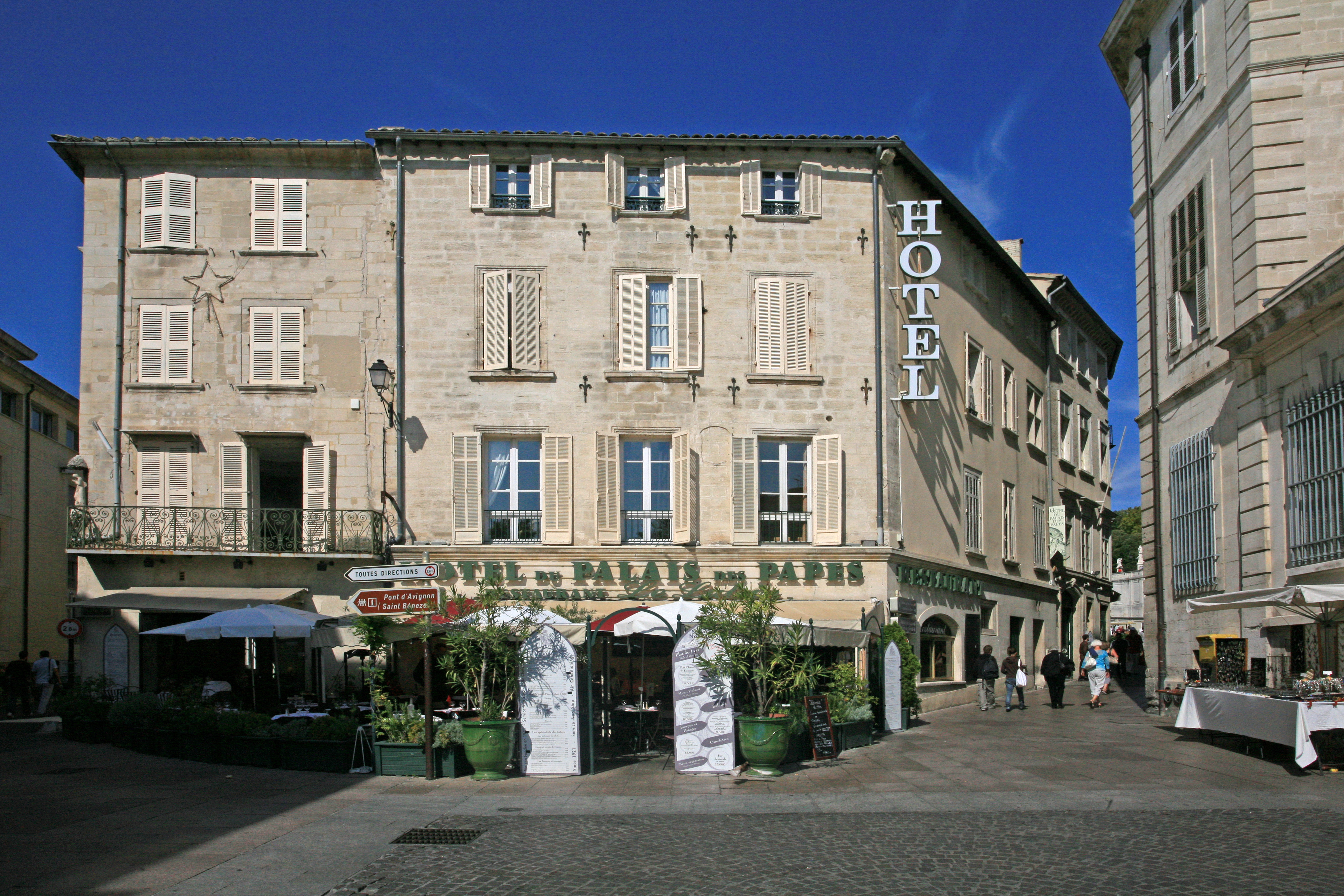 Ancienne maison de Datini, rue du Puits-des-Boeufs, Avignon, Vaucluse, France.